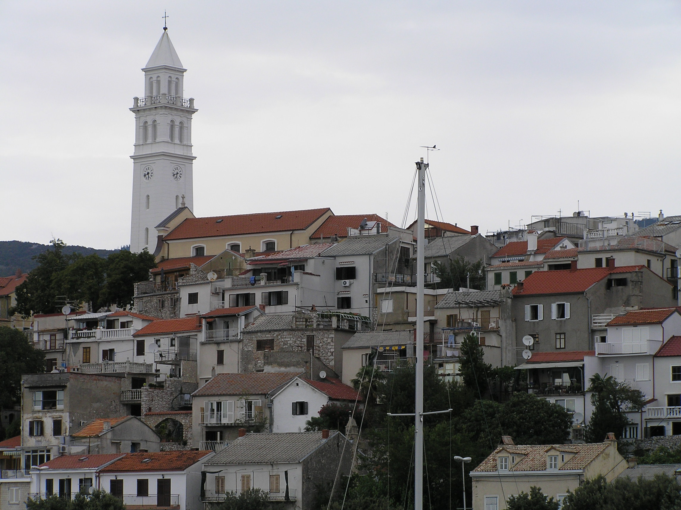 Novi Vinodolski - Stari Grad